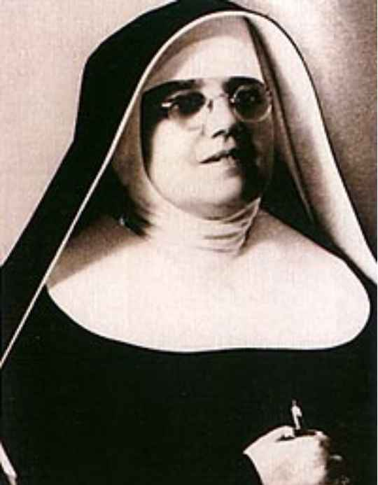 Sr.Marija vom gekreuzigten Jesus Petkovic (1892-1966)